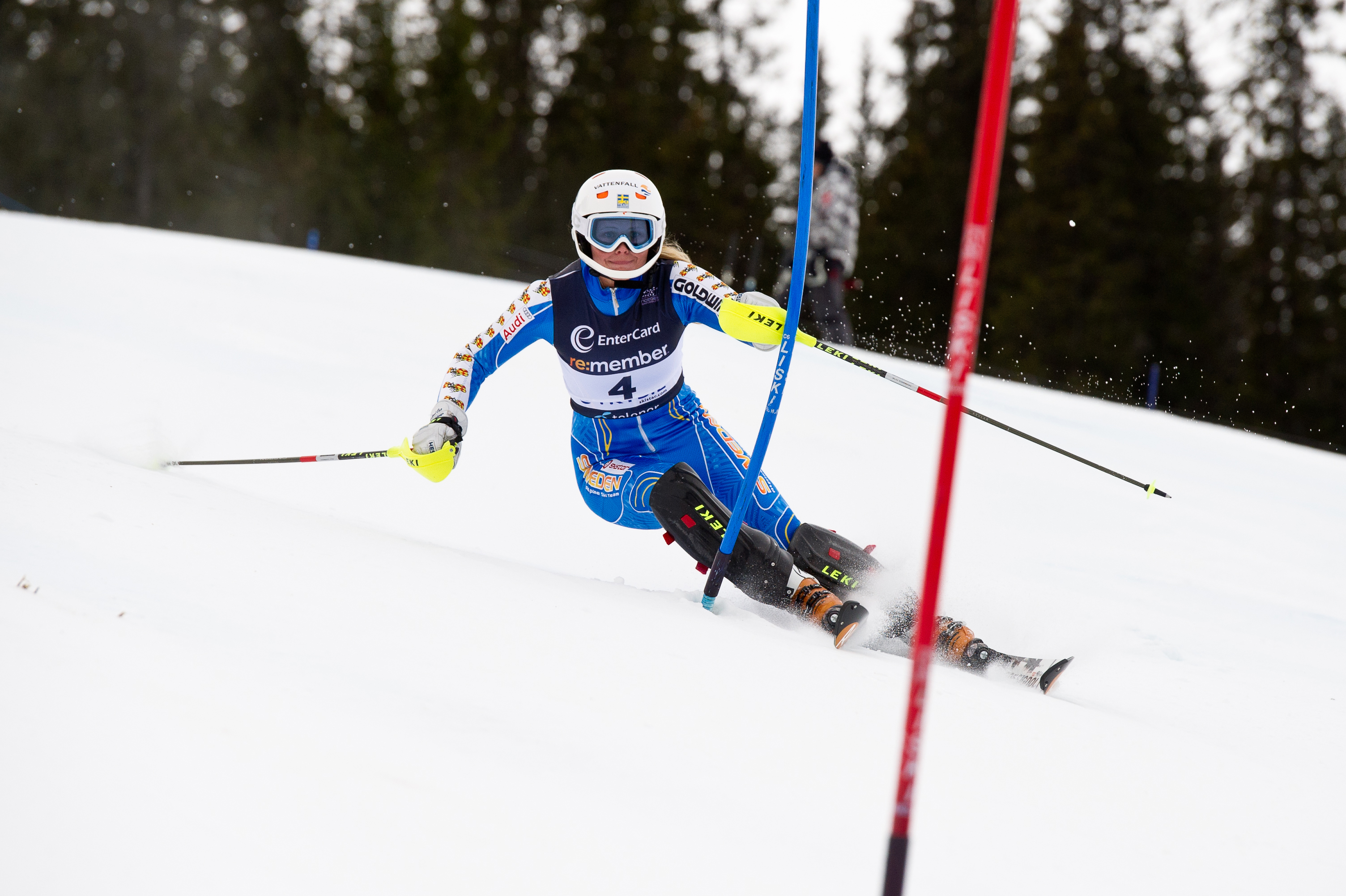 Nr. 10 Nathalie Eklund i NM i slalåm i Trysil 27. mars 2011. Foto: Ola Matsson